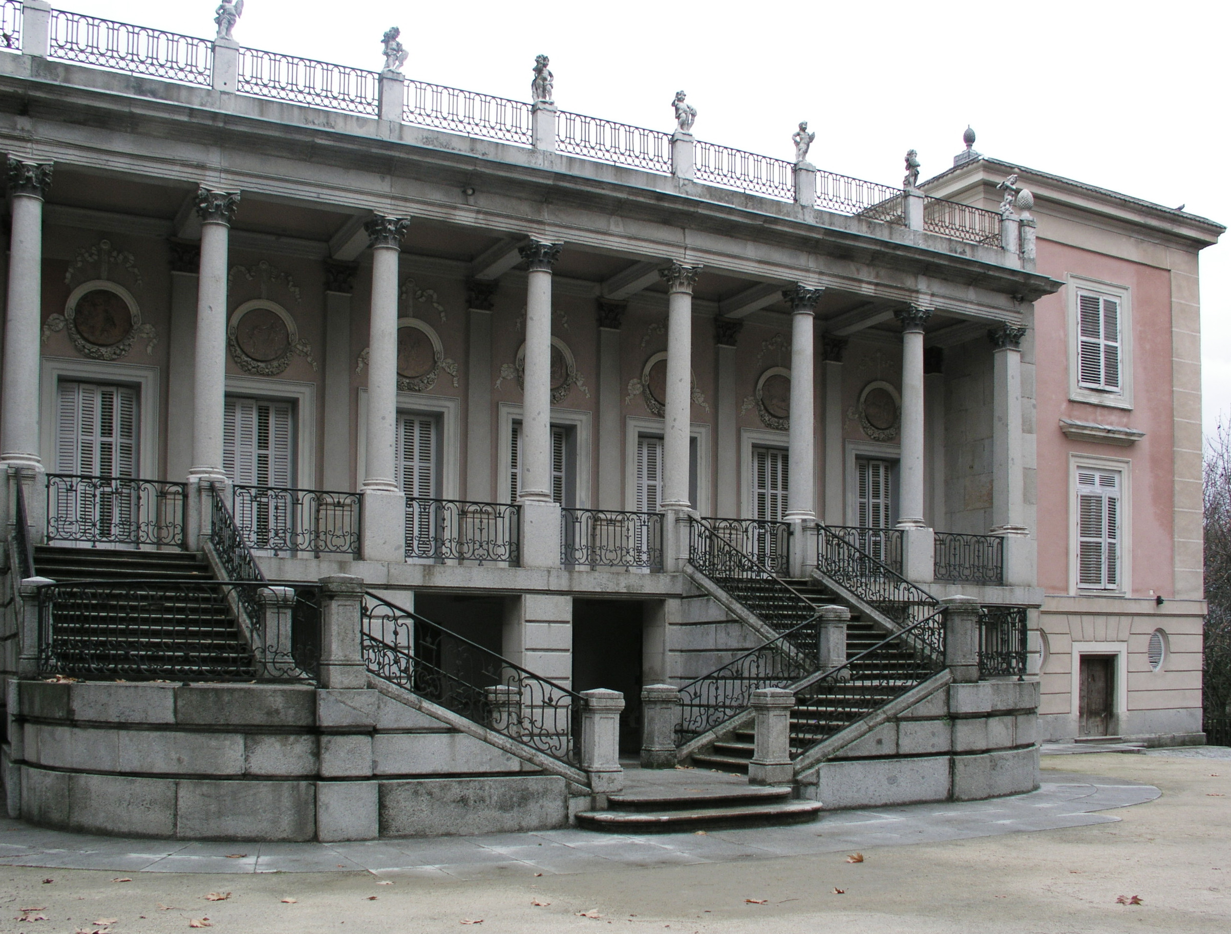 Jardín El Capricho, Madrid, Spain